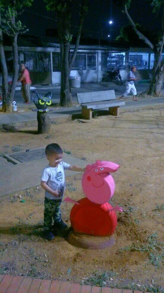 PEPPA PIG ELABORADA EN LLANTAS RECICLADAS POR ECOART ANTES CREACIONES EN LLANTAS EN CUCUTA COLOMBIA PROPIETARIOS JAIME SANCHEZ Y CAROLINA CELIS FUENTES